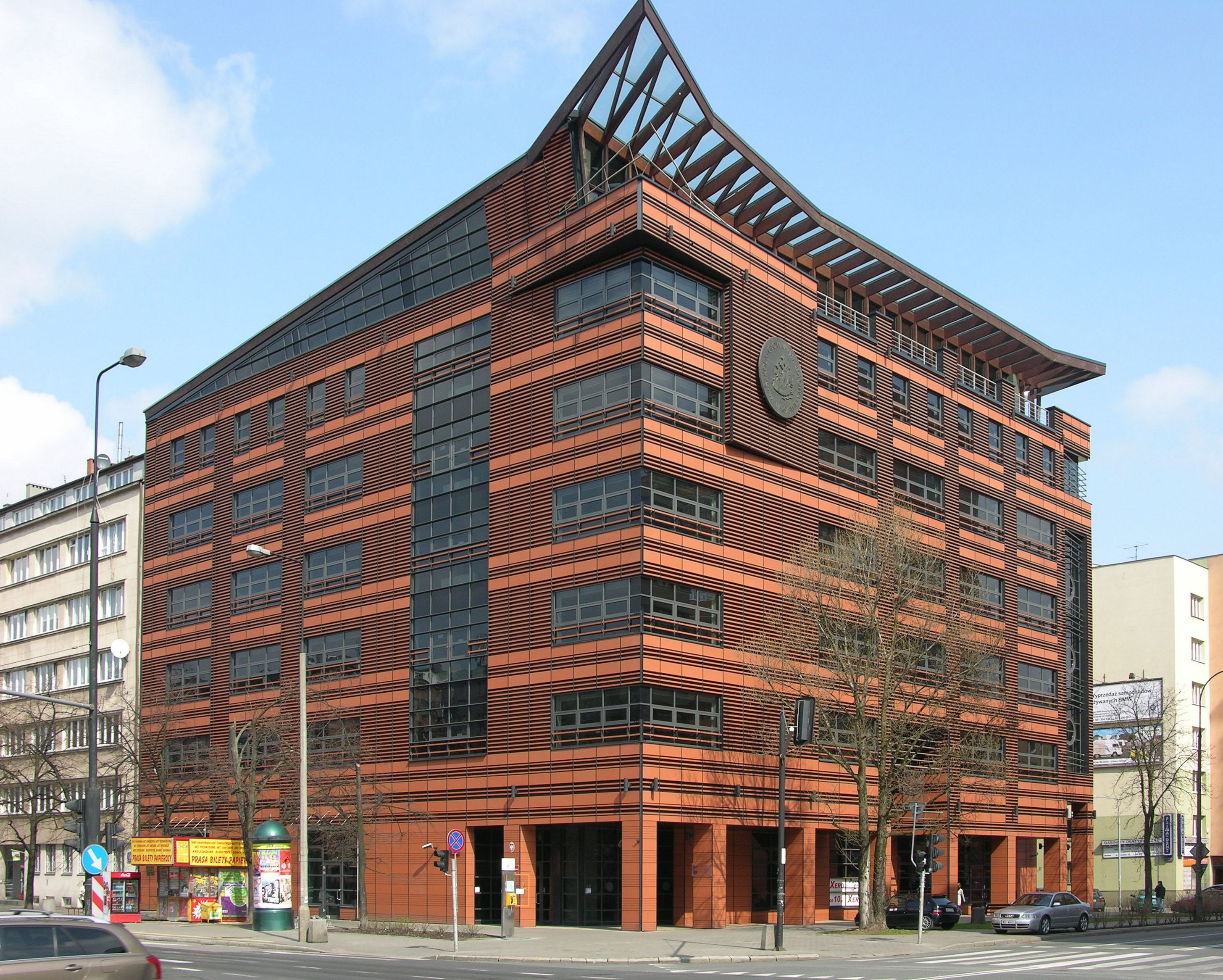 Budynek C SGH al. Niepodległości 128 róg al. Madalińskiego